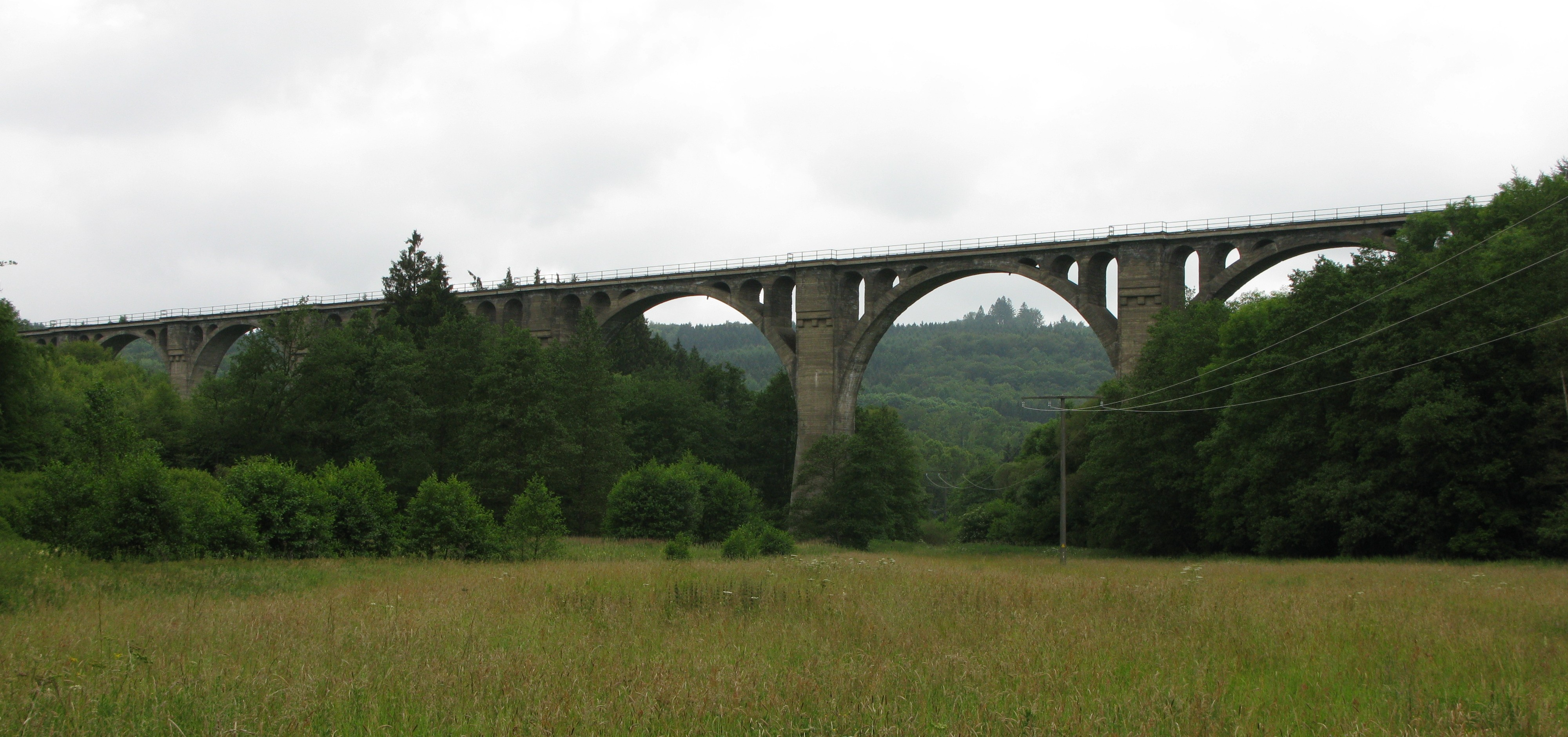 Eisenbahnbrücke über das Nistertal